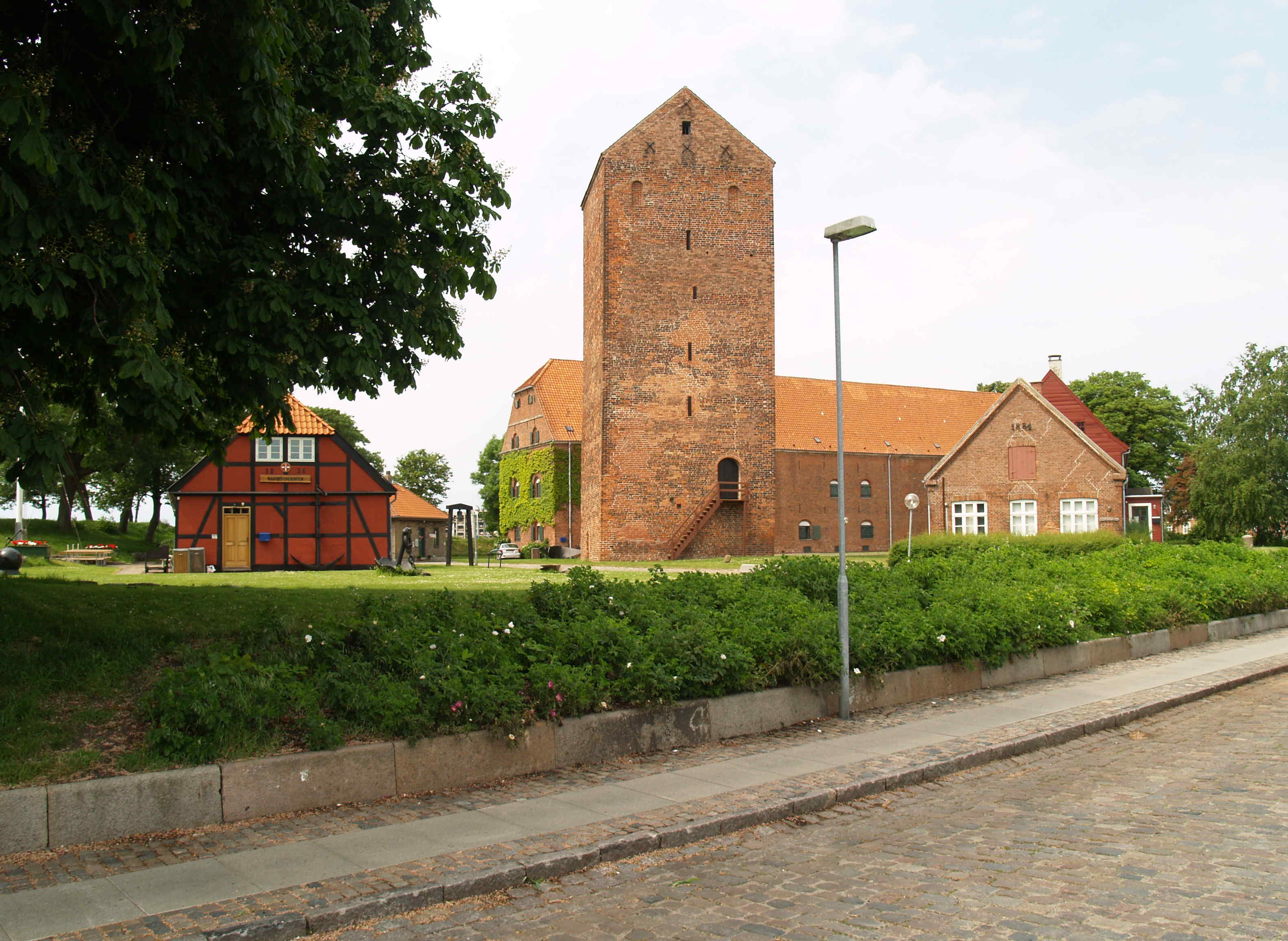 Festung Korsør